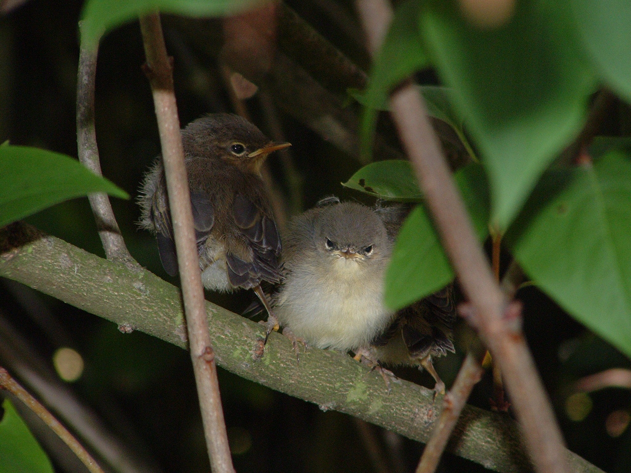 Fitisküken mit dem typischen gelben Brustkleid (Phylloscopus trochilus)